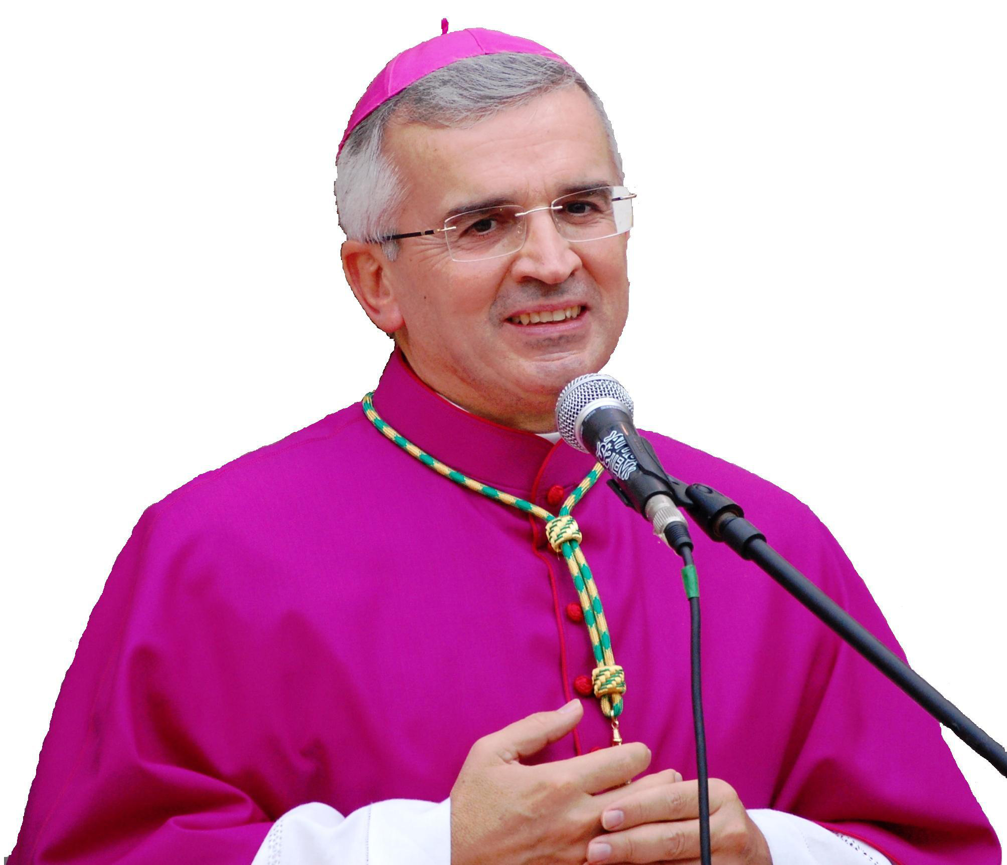 Manfredonia 19 settembre 2009, Insediamento nella Arcidiocesi di Manfredonia-Vieste-San Giovanni Rotondo. Discorso a Palazzo San Domenico. Foto di Marcello Castigliego.